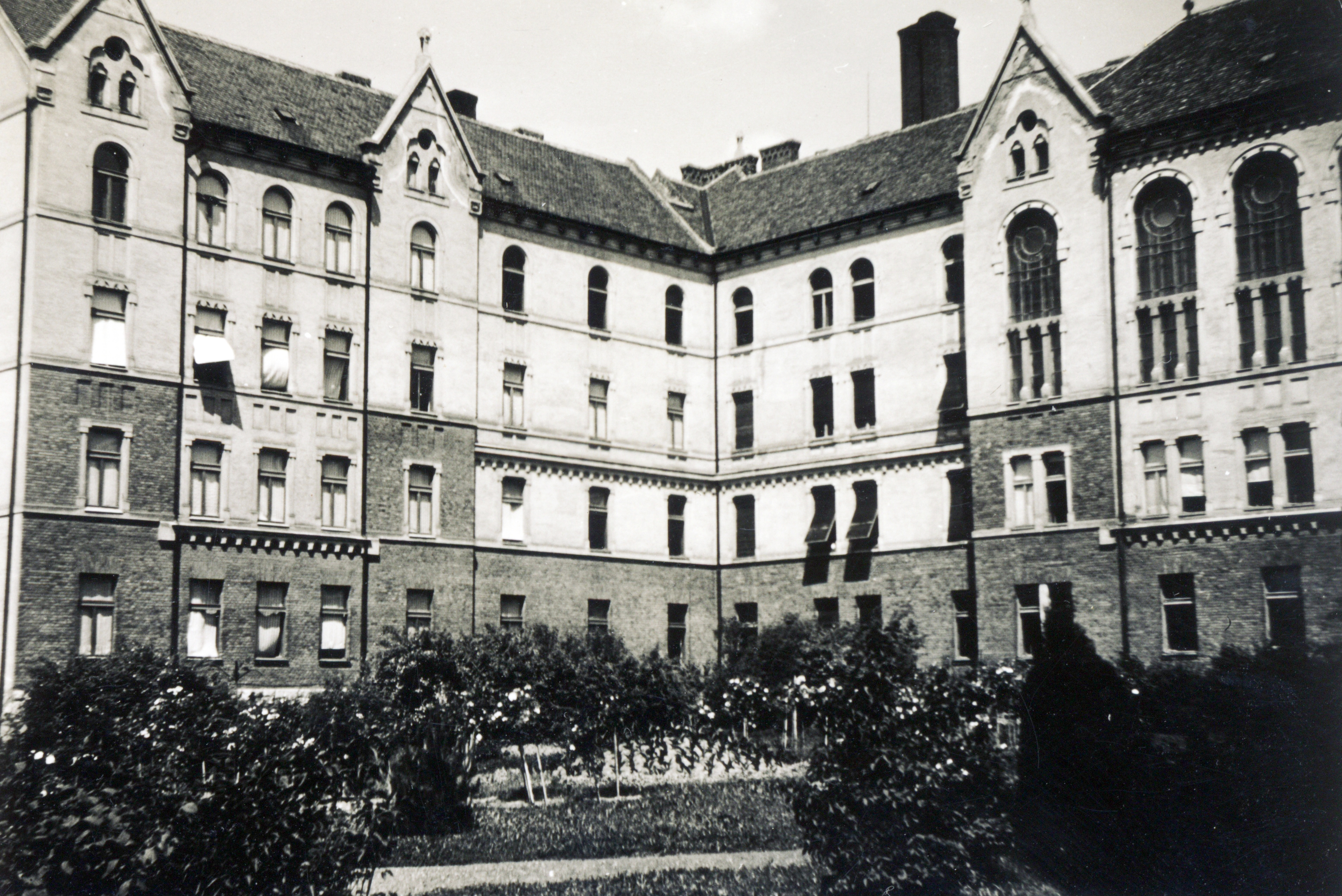 a jezsuita Pius gimnázium és internátus (ma Pécsi Tudományegyetem) épülete. Location: Hungary Title: a jezsuita Pius gimnázium és internátus (ma Pécsi Tudományegyetem) épülete.